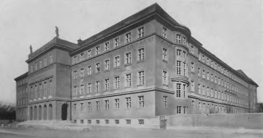 Die Reichsbahndirektion in Oppeln. Fotografiert von Max Glauer aus Oppeln.